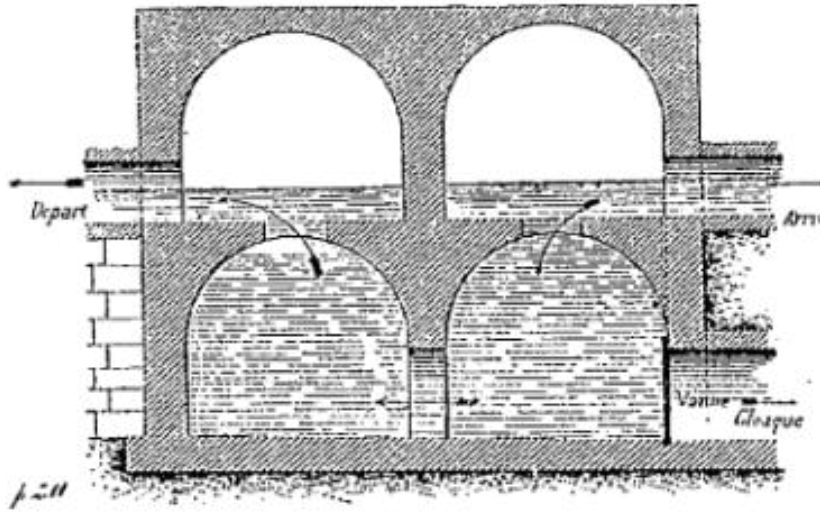 “Piscine épuratoire” (bassin de décantation) de l'aqueduc antique de l'Aqua Virgo, alimentant jadis Rome en eau potable.